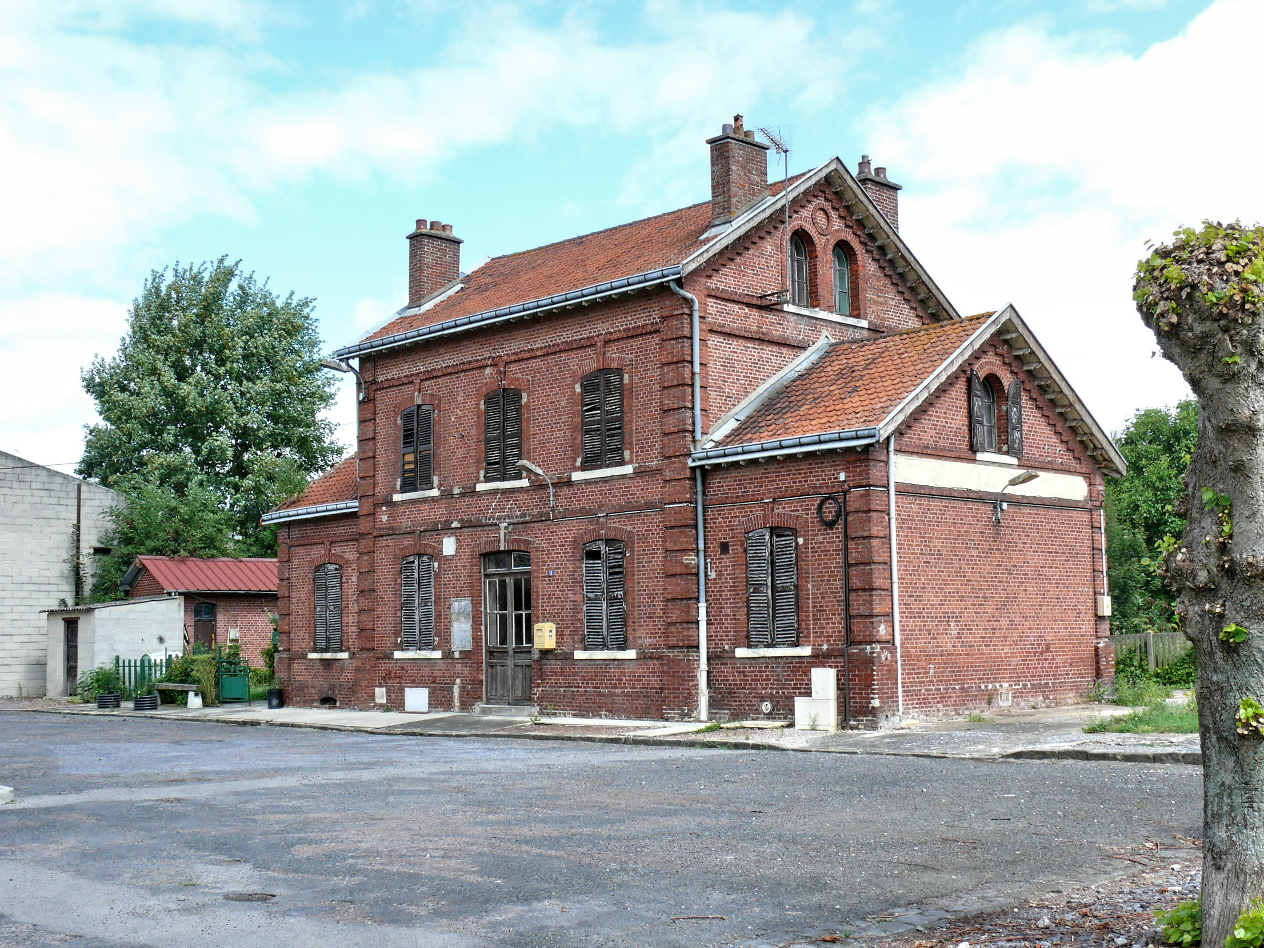 Gare d'Hargicourt-Pierrepont : l'ancien bâtiment, de style typiquement "Nord", est désaffecté, et la nouvelle halte est située 200 m au sud